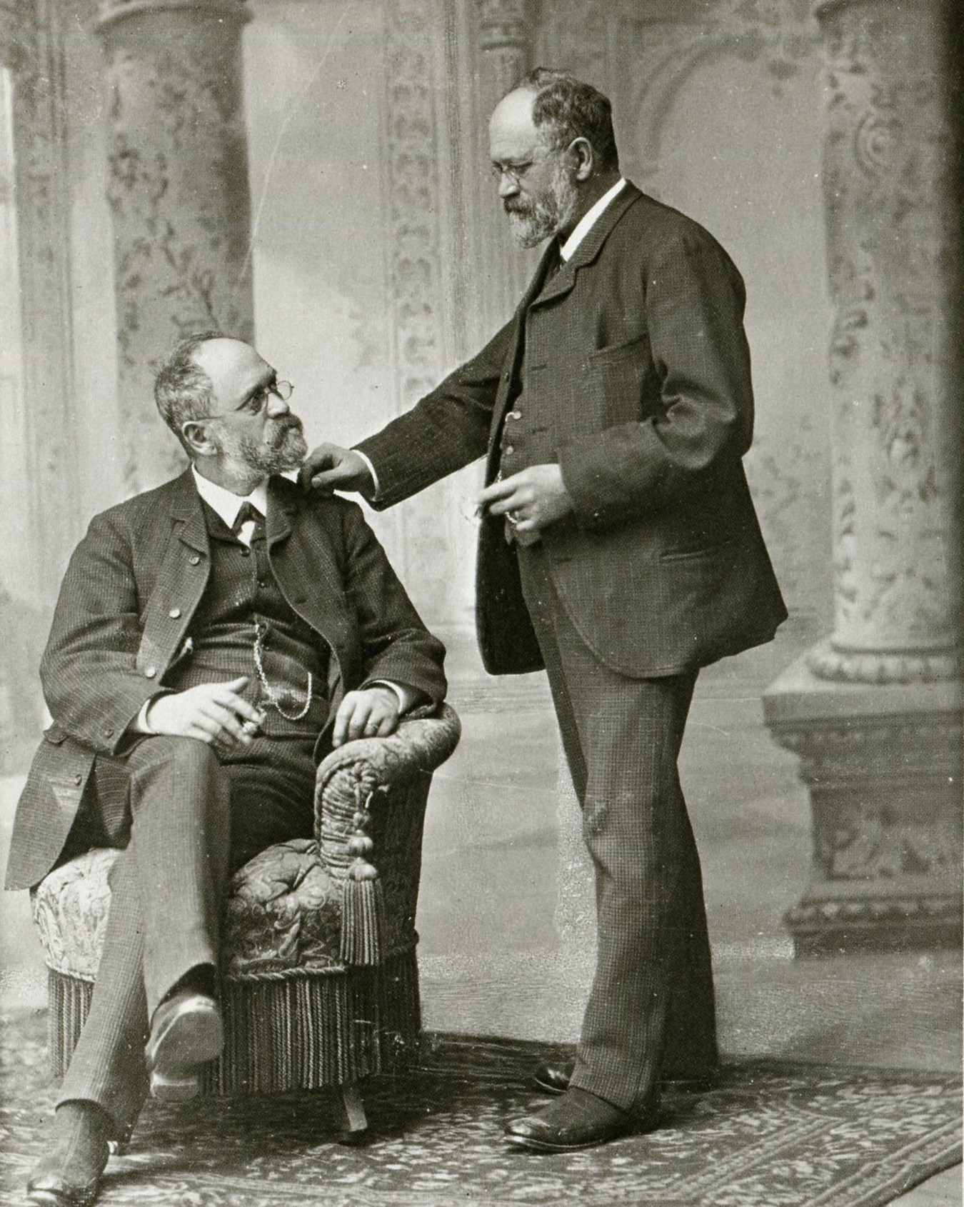 Dubbelgångarebild på Johannes Jeager, fotograf Valentin Wolfenstein